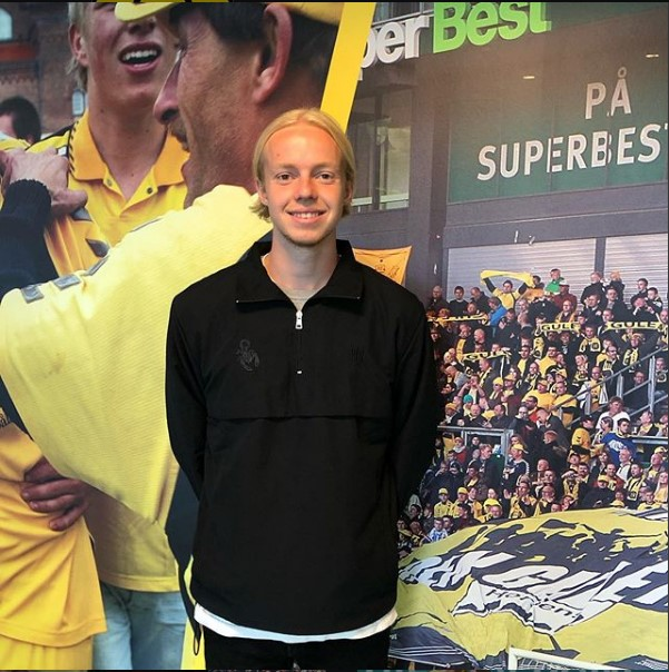 Billede af Peter Therkildsen på AC Horsens kontor.